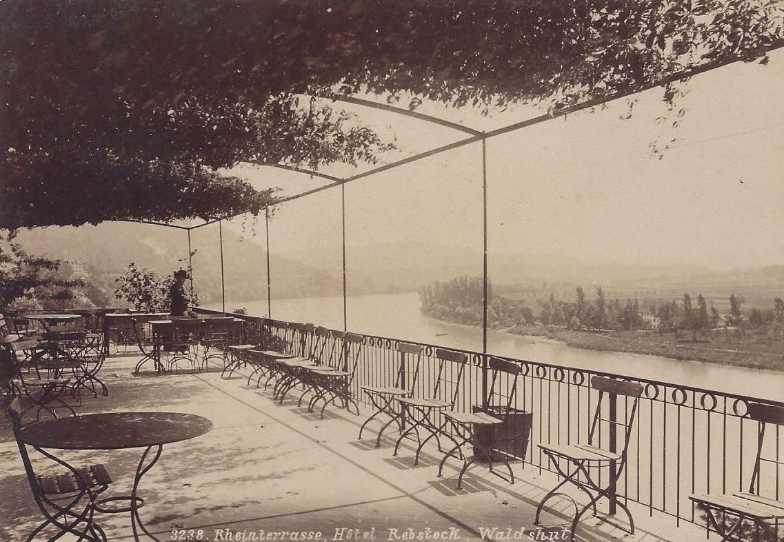 Christof Clare, Hoffotograf, Freiburg im Breisgau: Foto 3238 Rheinterasse, Hotel Rebstock, Waldshut.